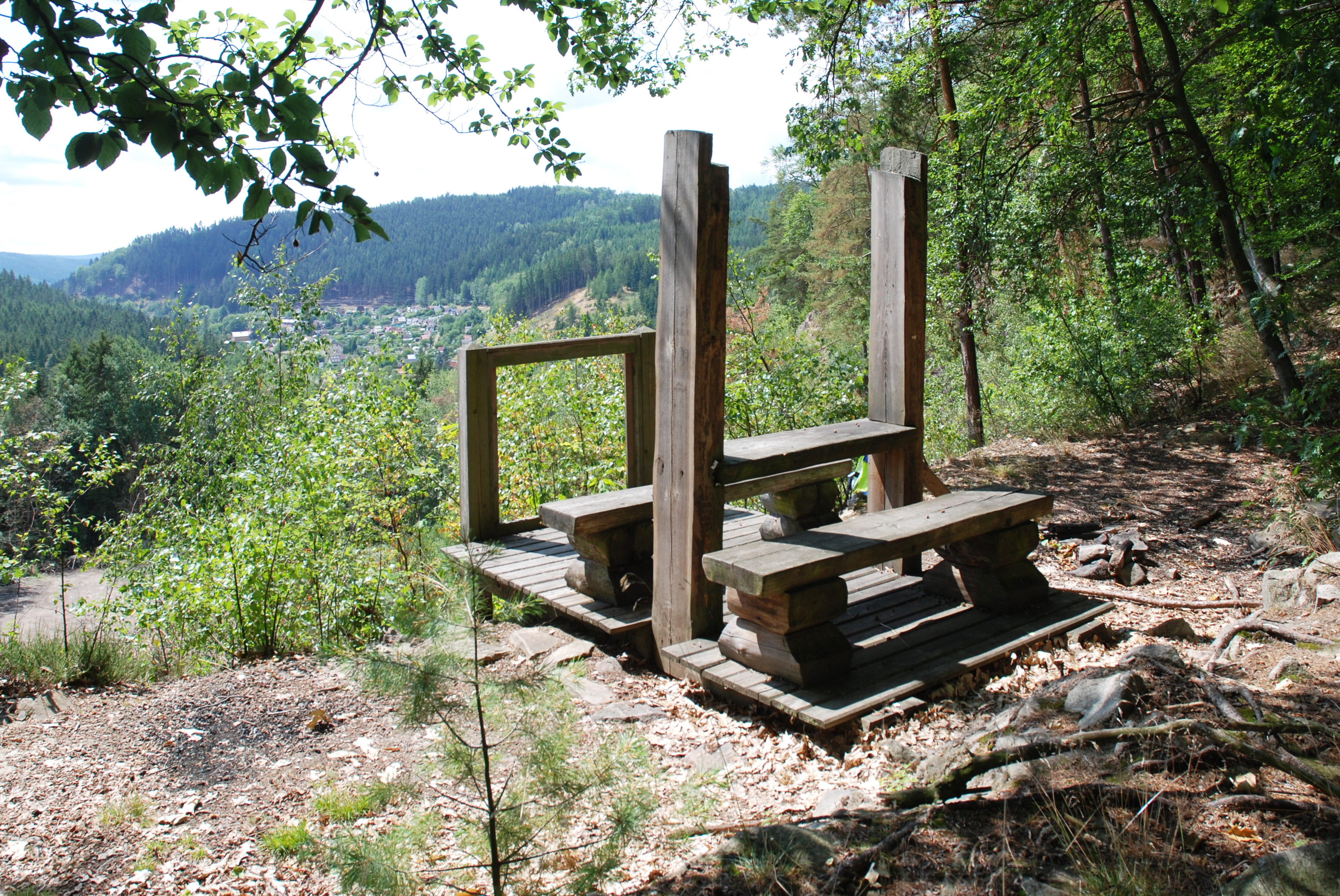 Poničená vyhlídka Nad Lomem v karlovarských lázeňských lesích